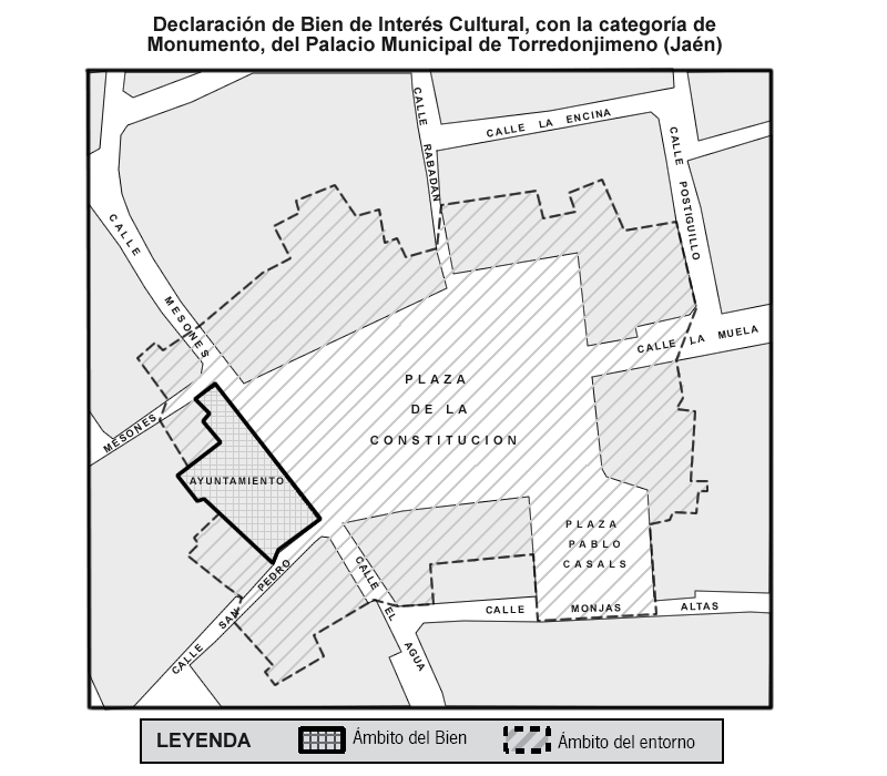 Declaración de Bien de Interés Cultural, con la categoría de Monumento, del Palacio Municipal de Torredonjimeno (Jaén).